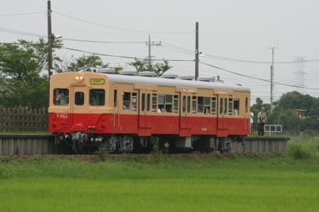 久留里線のキハ30です